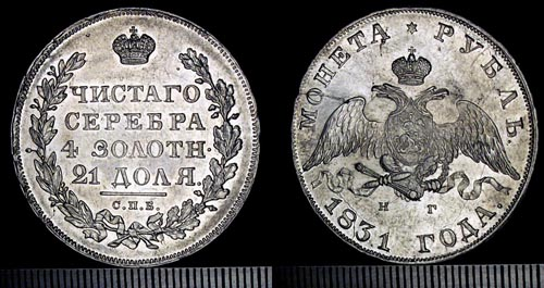 Рубль Николая 1 1831 серебро